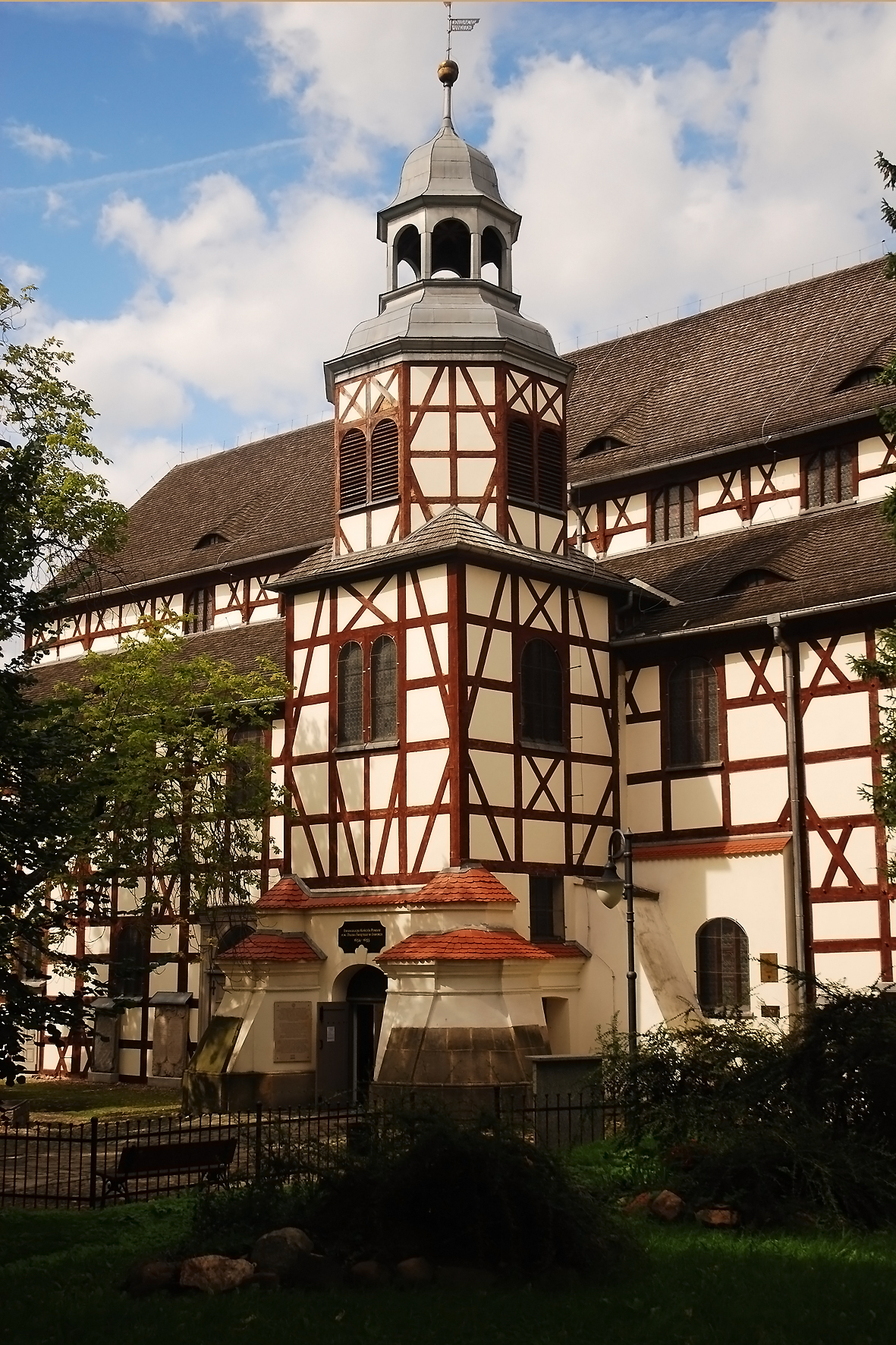 Jawor Kościół Pokoju